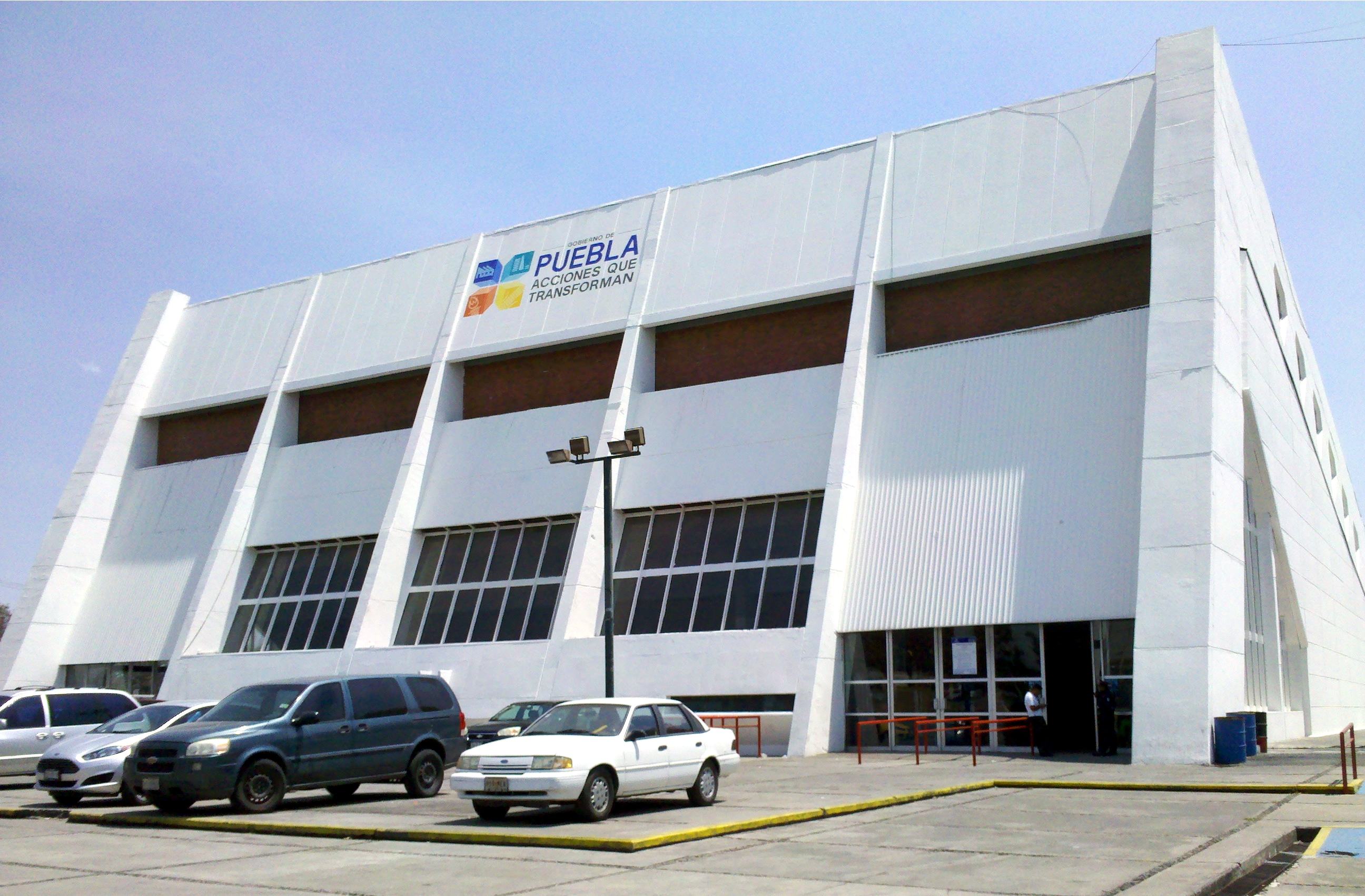 Exterior del Gimnasio Miguel Hidalgo, Puebla, México.